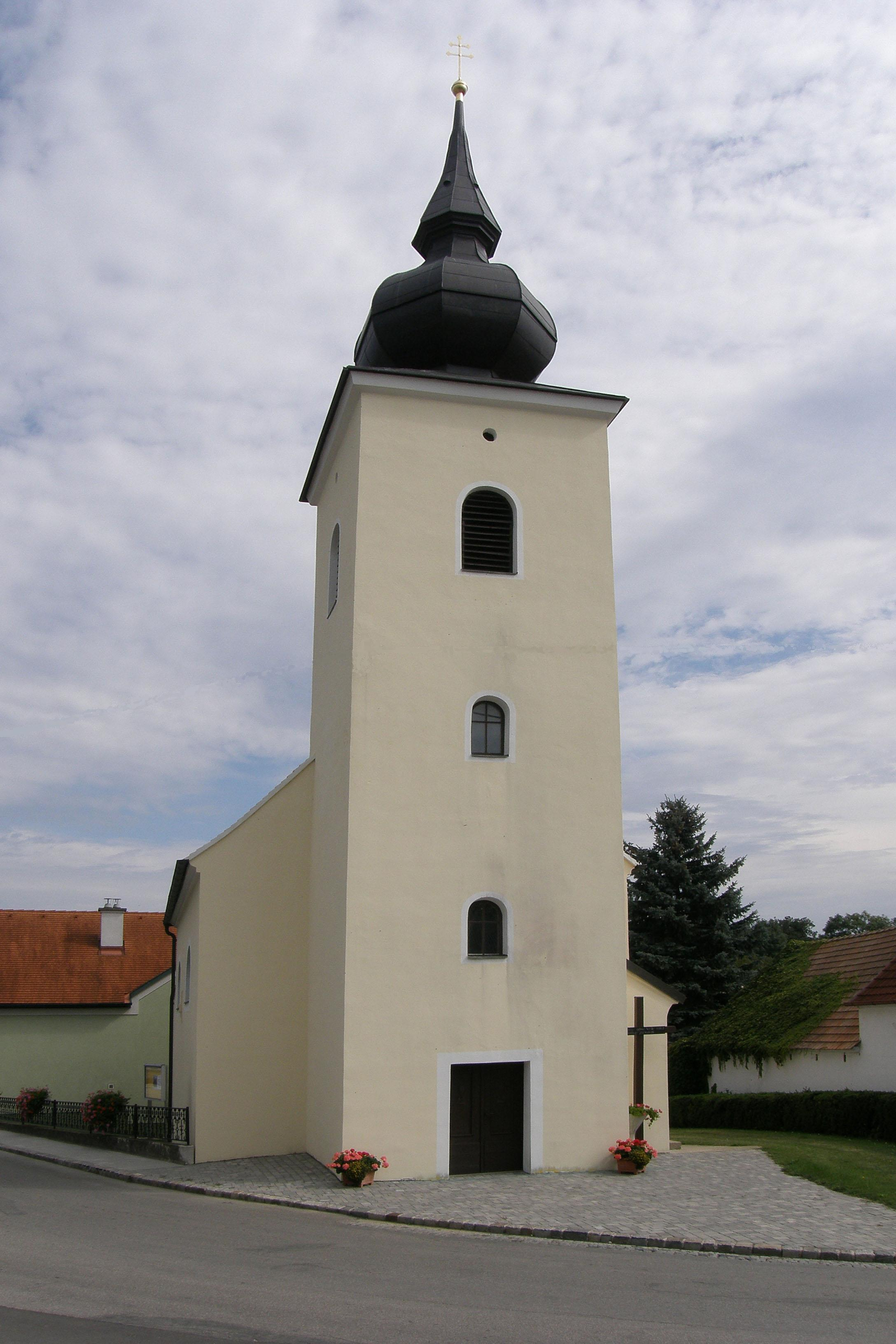 Wallfahrtskirche hl. Herz Mariens und ehem. Friedhof